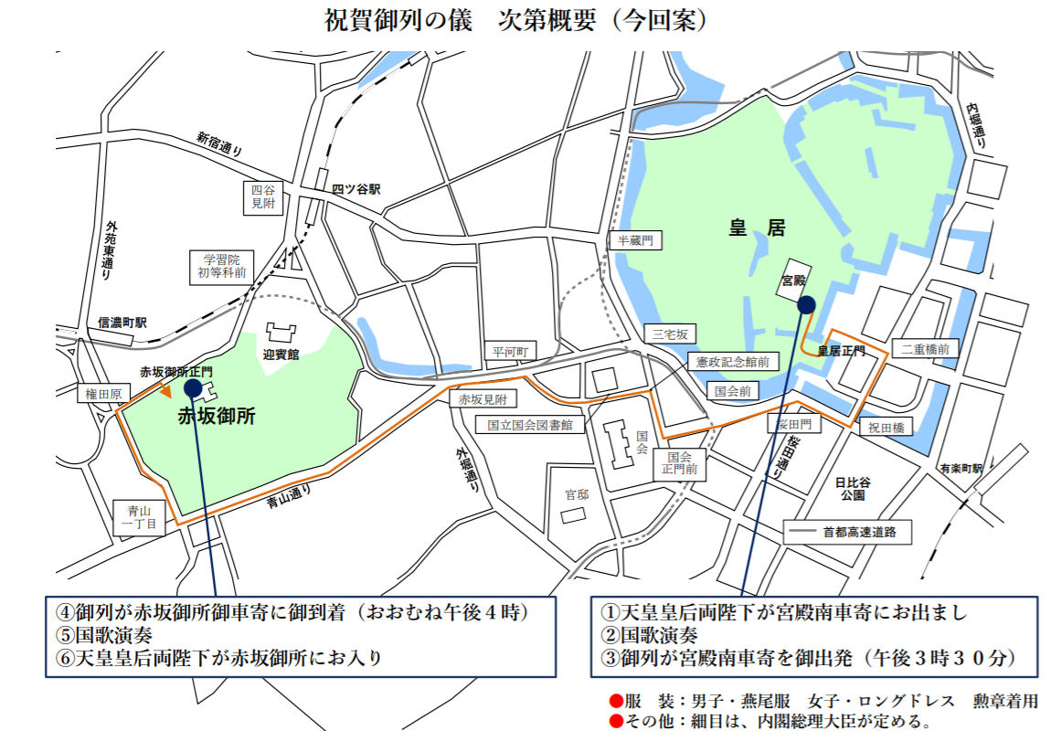 祝賀御列の儀 次第概要